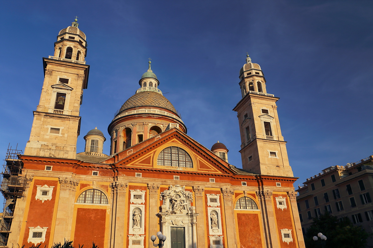 Eglise Santa Maria Assunta di Carignano à Gênes